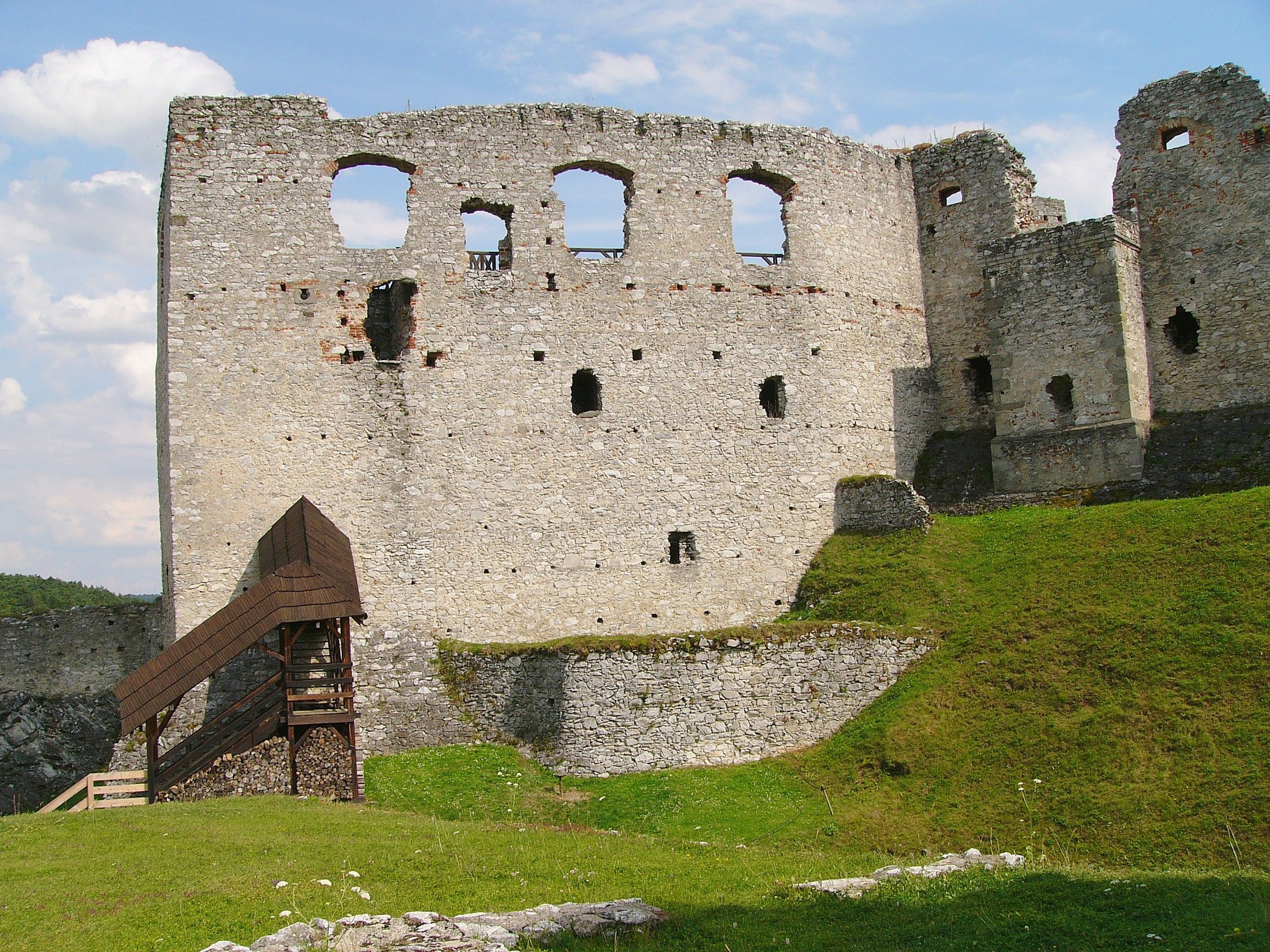 Budova "Nových pokojů" z vekéh nádvoří od západu